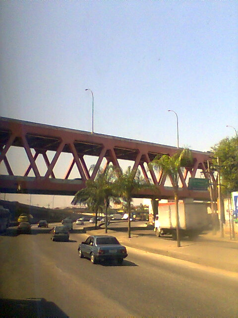 Linha vermelha, vista no ponto emque cruza a Avenida Brasil. Rio de Janeiro, RJ. Brasil